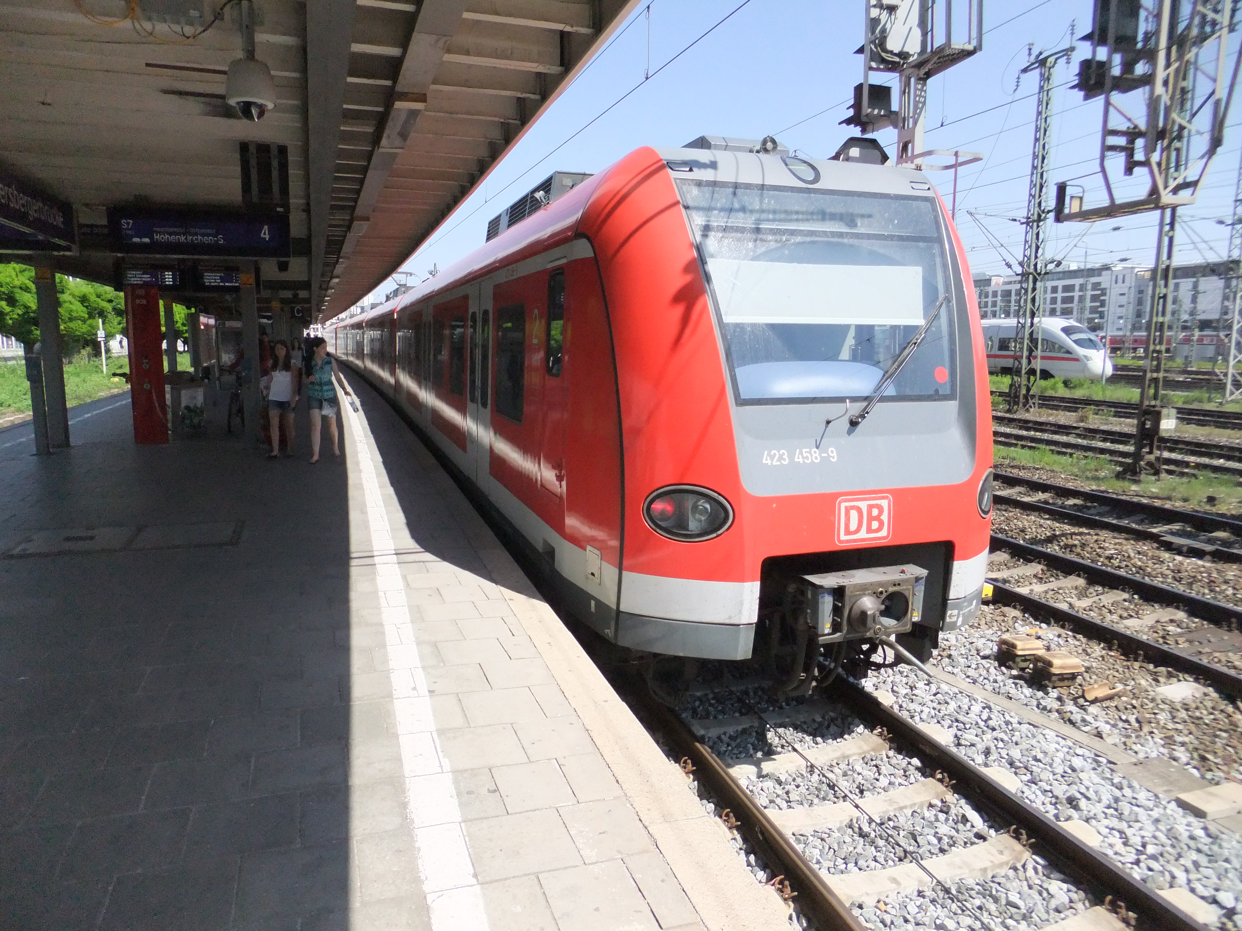 DBAG-Baureihe 423 der S-Bahn München auf der Linie S7 im Bahnhof München Donnersbergerbrücke